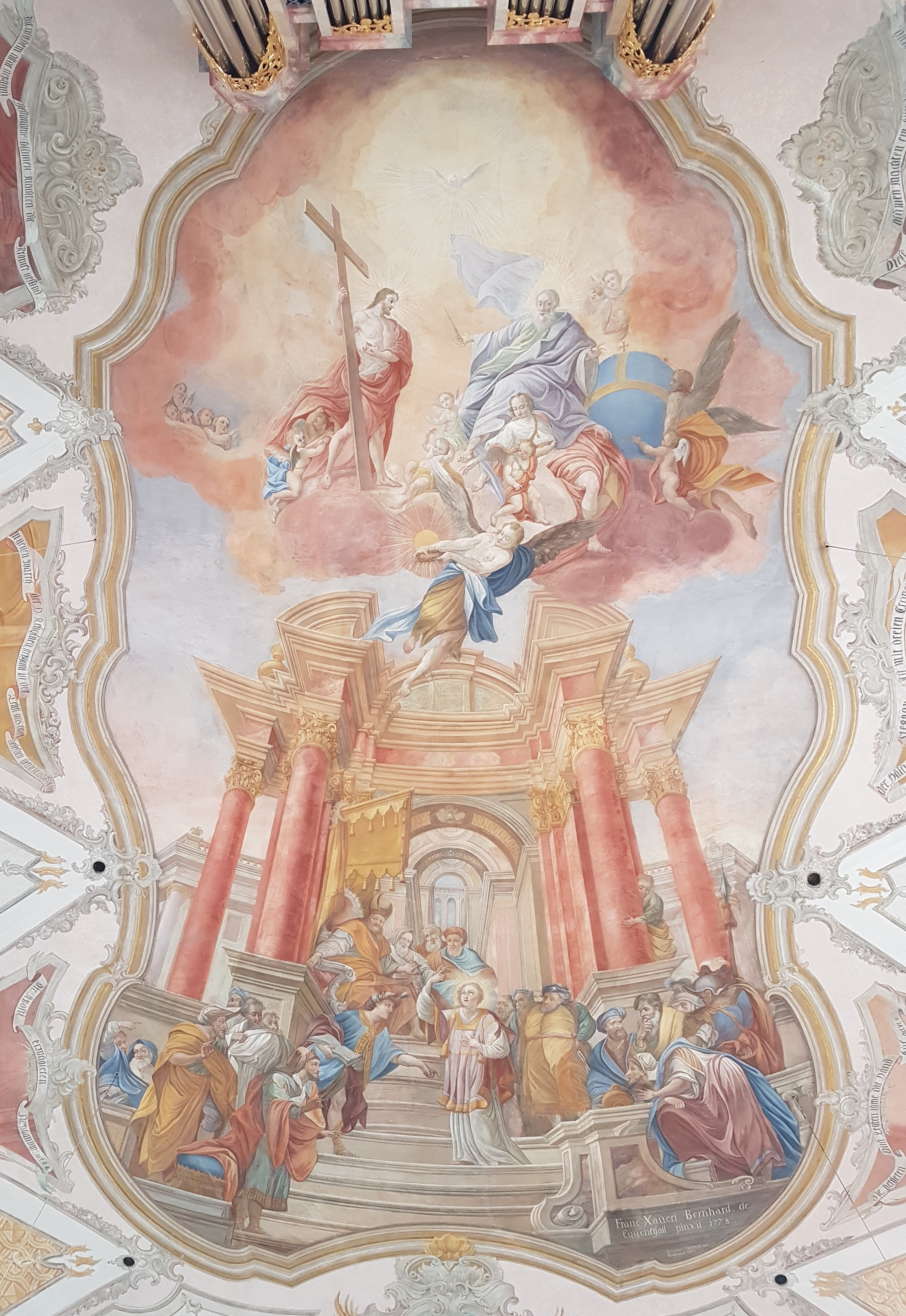 Burggen, Pfarrkirche St. Stephan